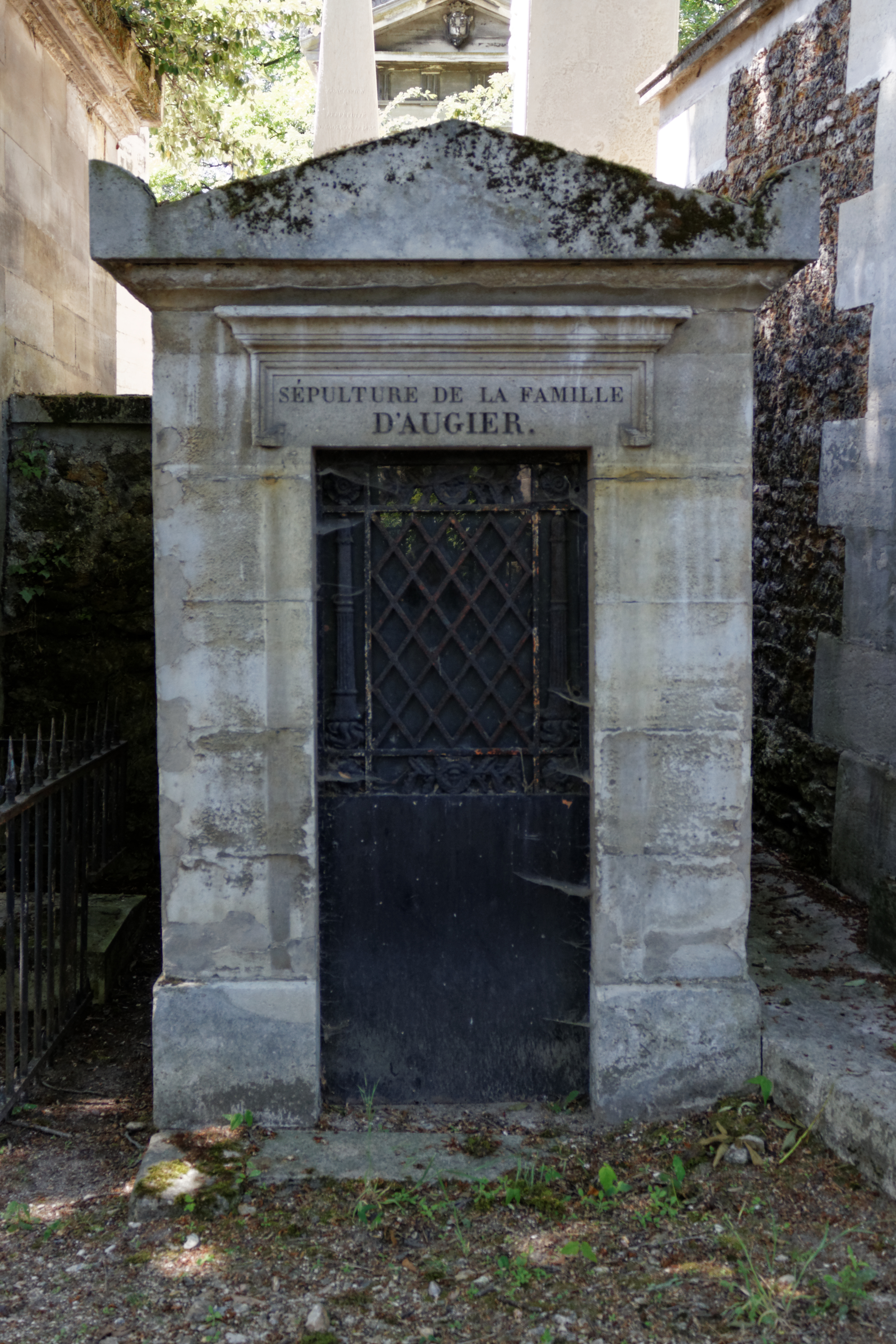 Chapelle du vice-amiral François-Henri-Eugène d'Augier (1764-1834).